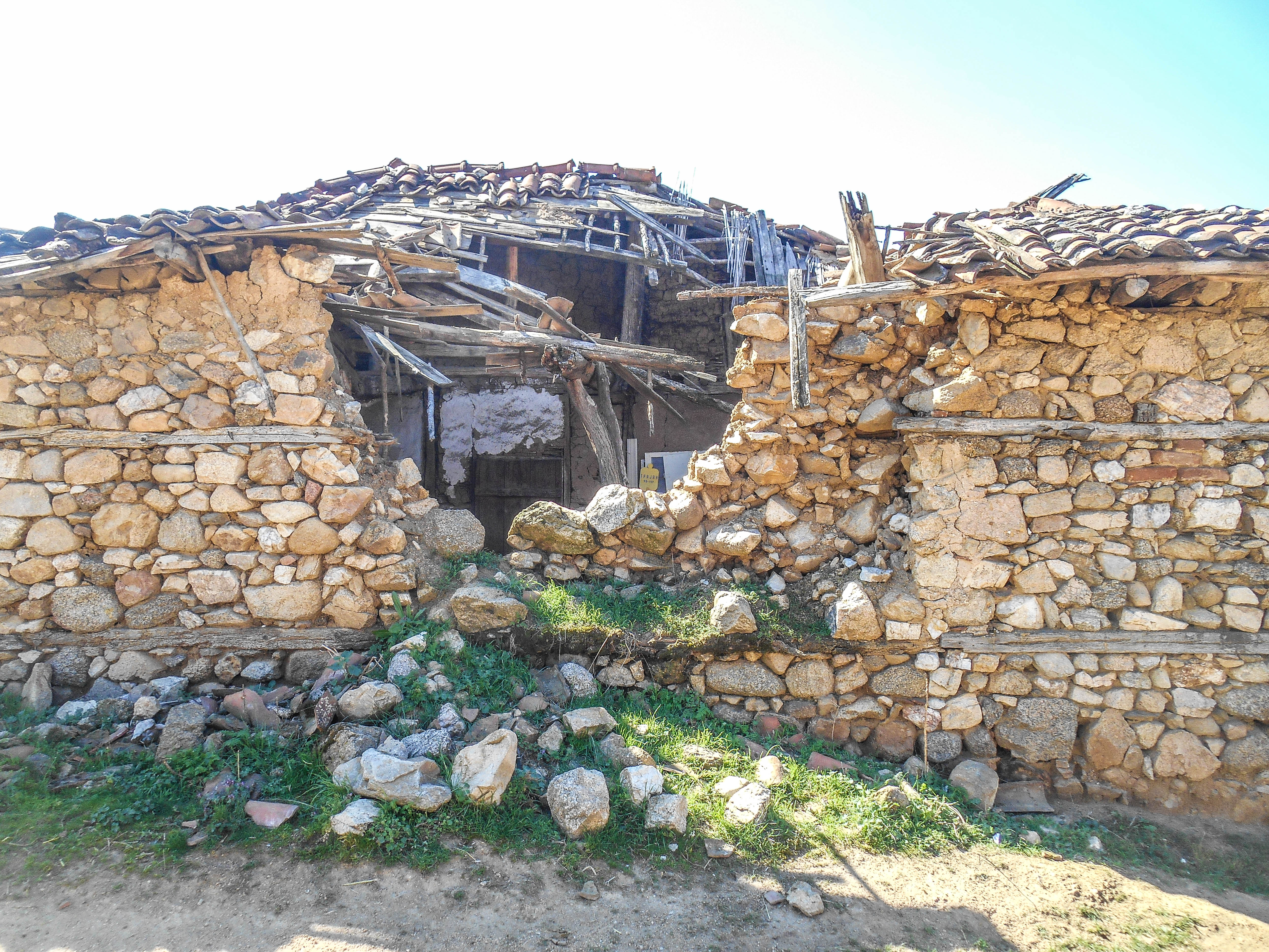 Дрвош